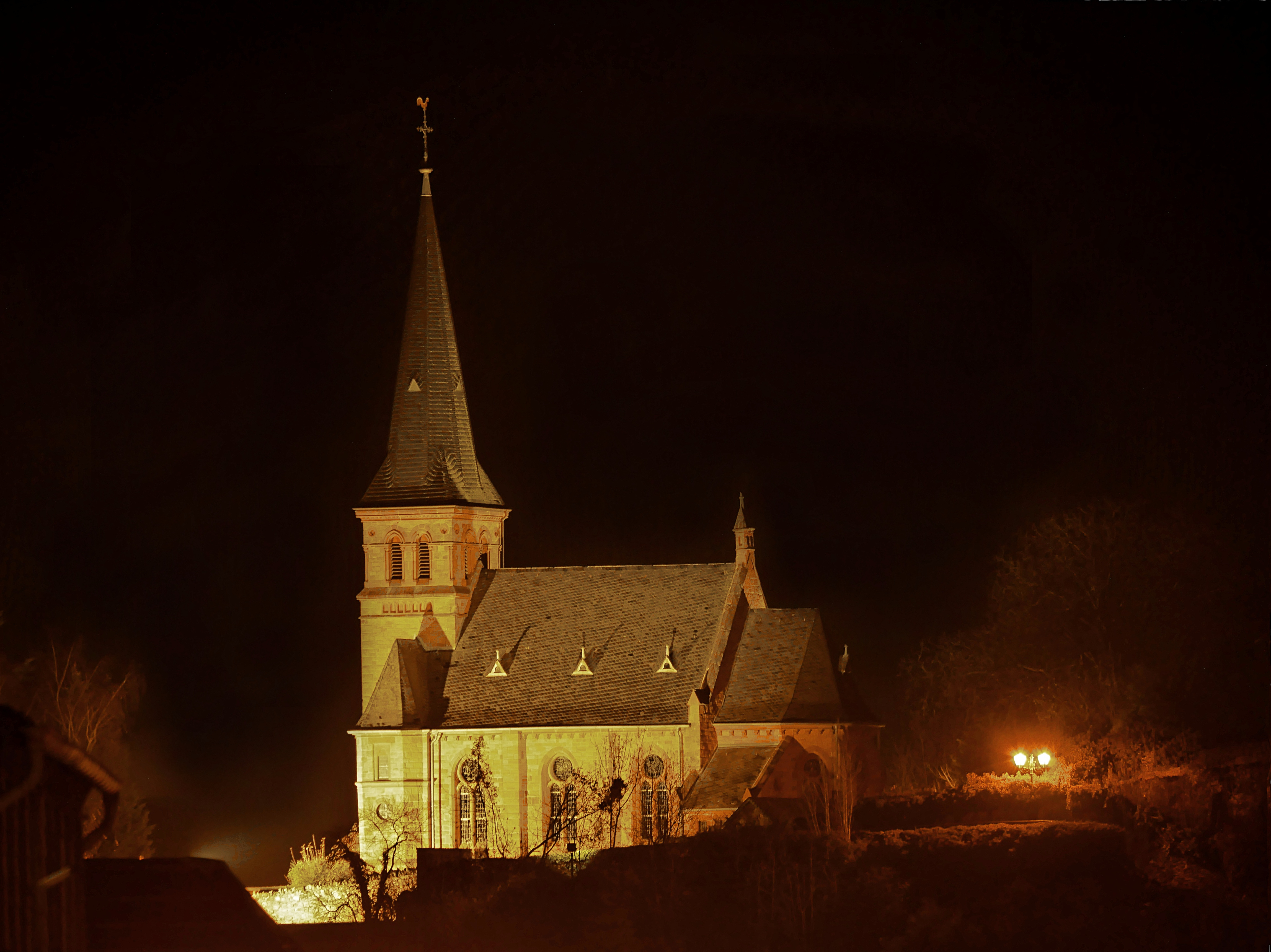 Saarburg (Kreis Trier-Saarburg), Evangelische Pfarrkirche, neugotischer Saalbau, 1892/93, Architekt Natorp